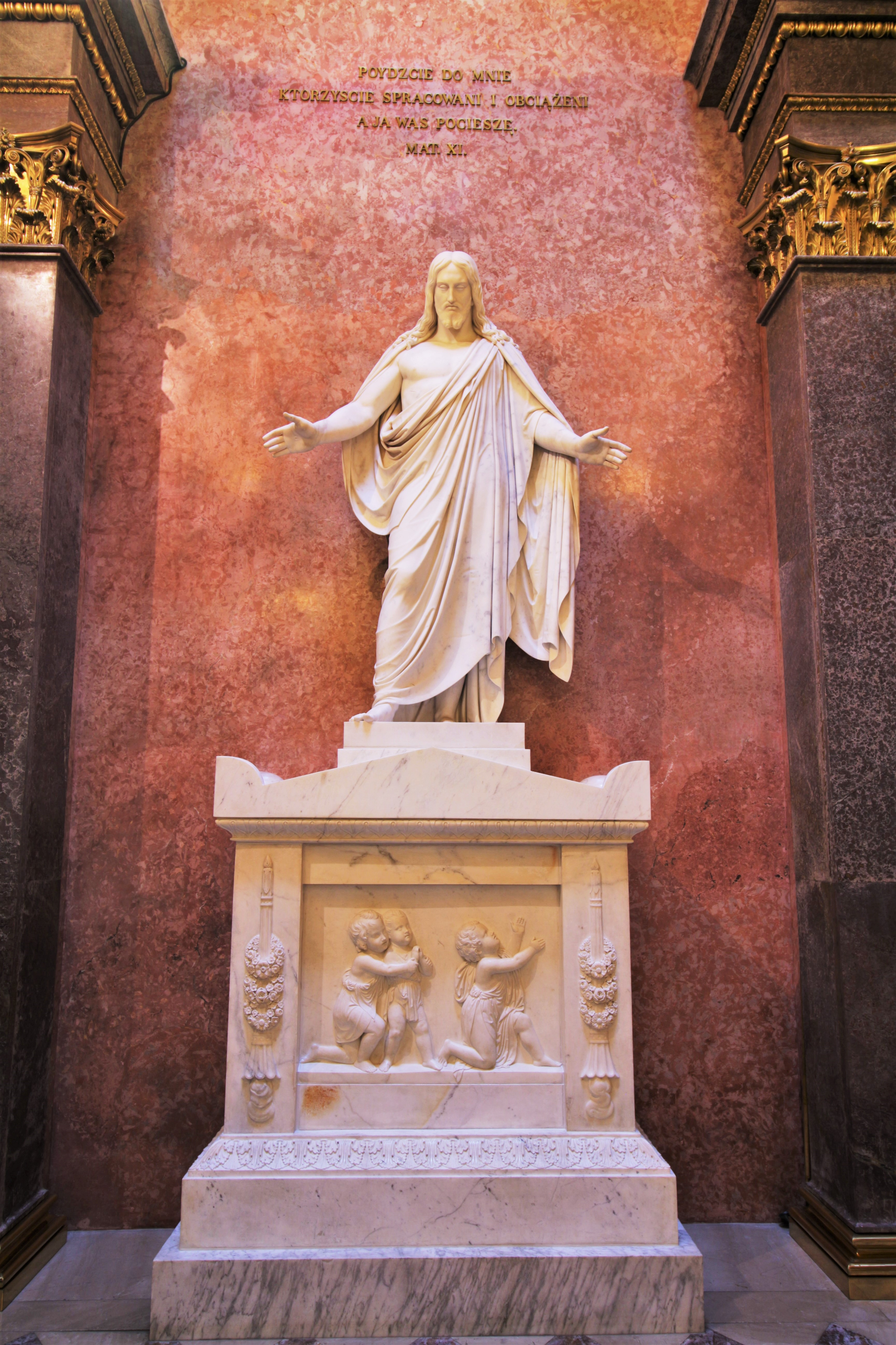 Kraków, Kaplica Potockich na Wawelu - posąg Chrystusa autorstwa Bertela Thorvaldsena